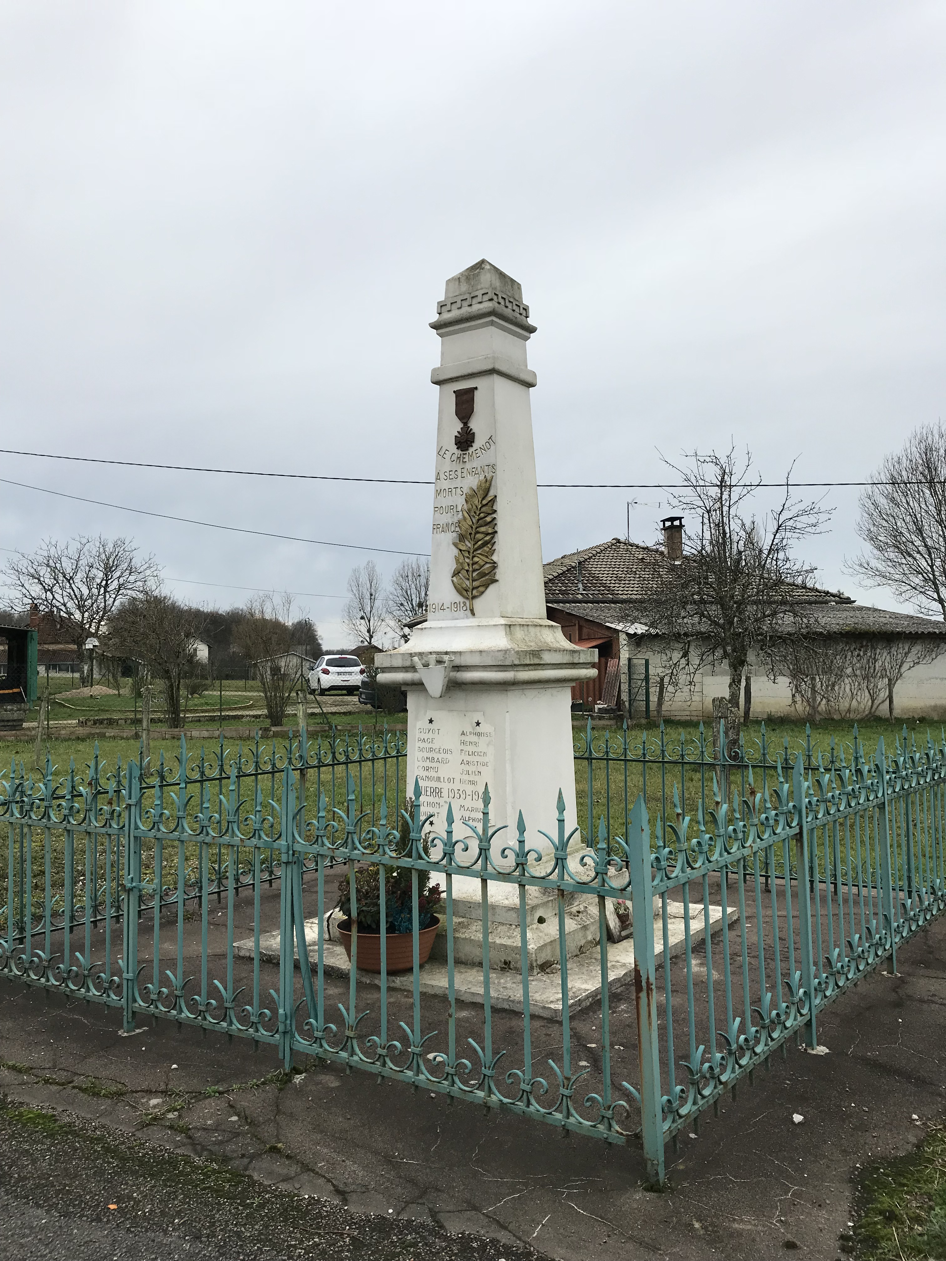 Chemenot (Jura, France) en janvier 2018.